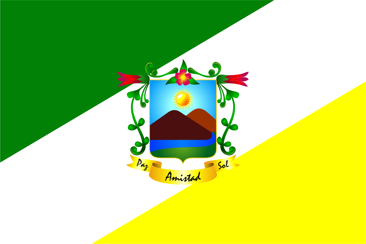 Distrito de Chaclacayo - Provincia de Lima - Región Lima